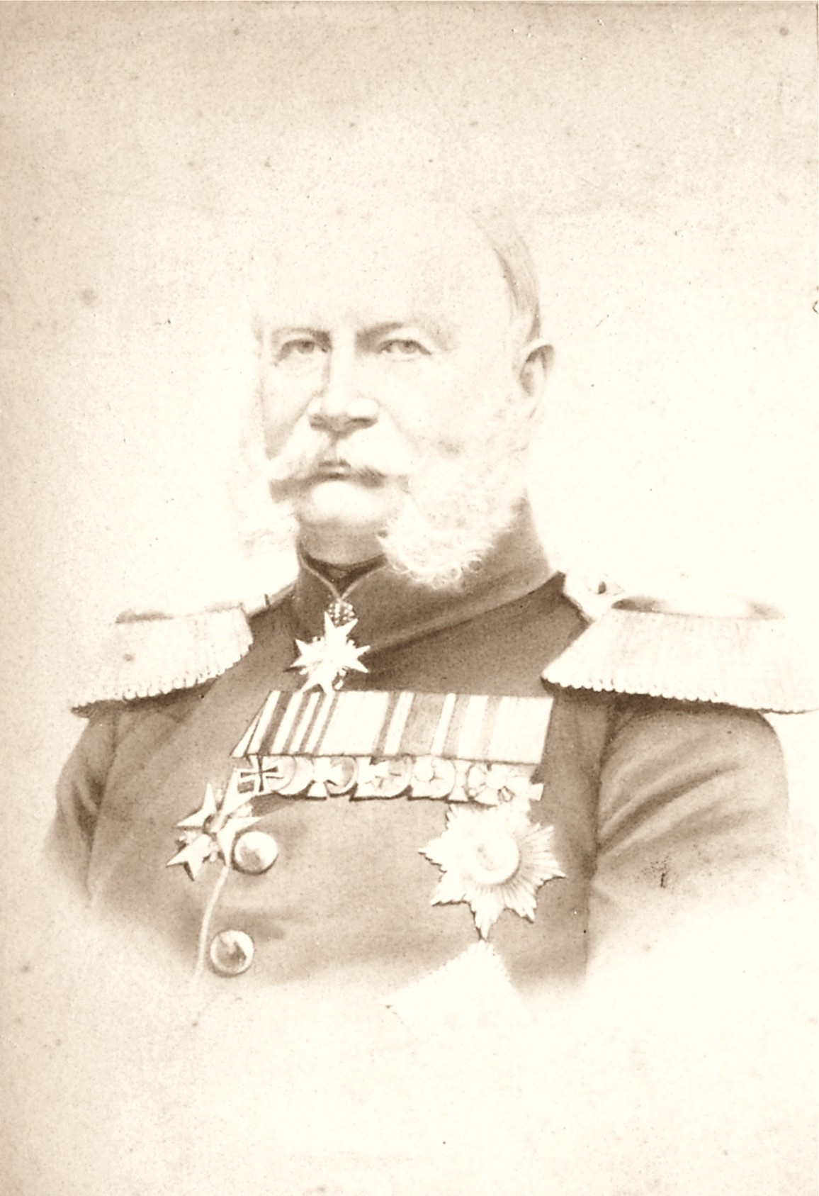 Wilhelm I., Deutscher Kaiser